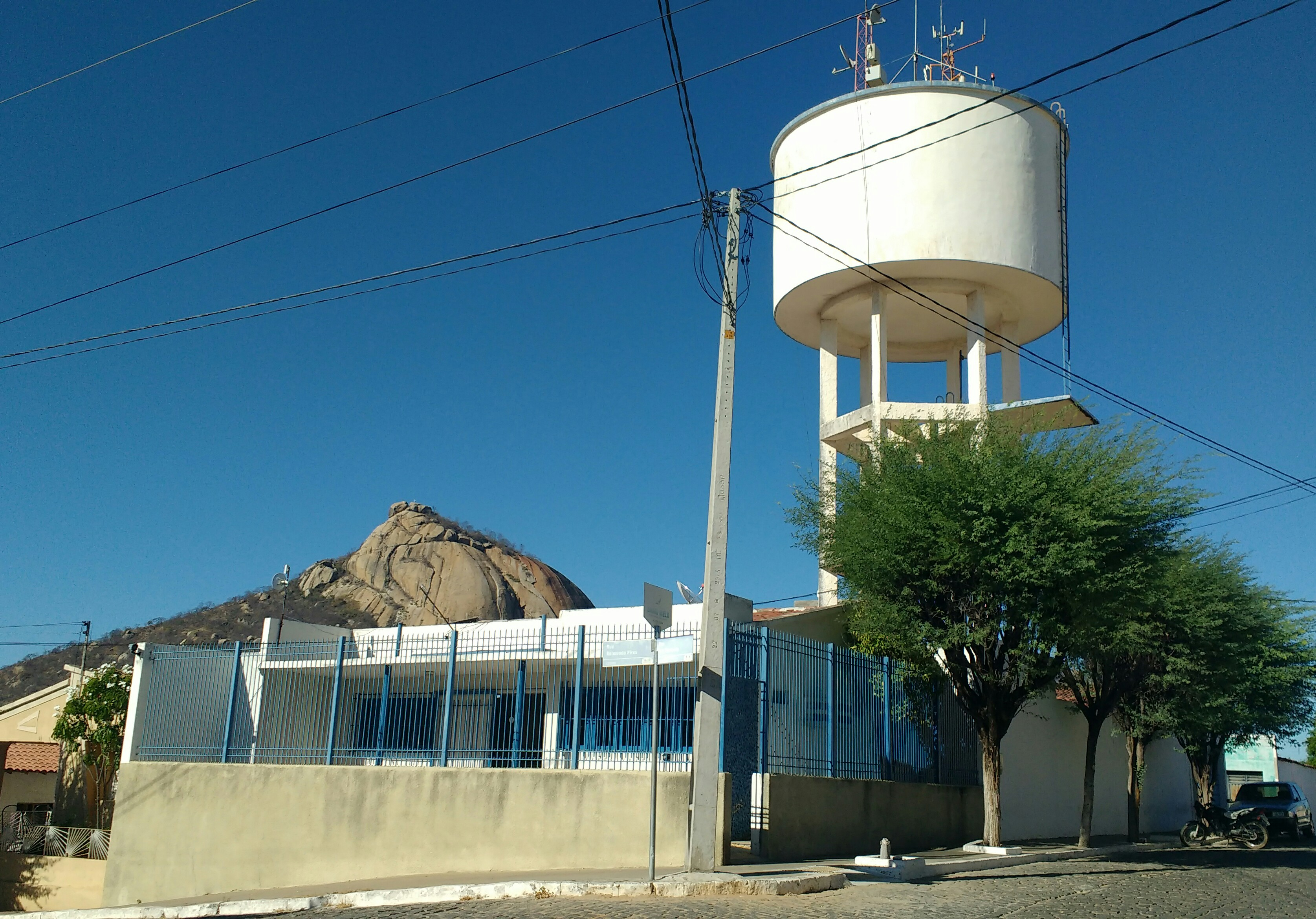 Escritório do Serviço Autônomo de Água e Esgoto em Alexandria, Rio Grande do Norte (Brasil).